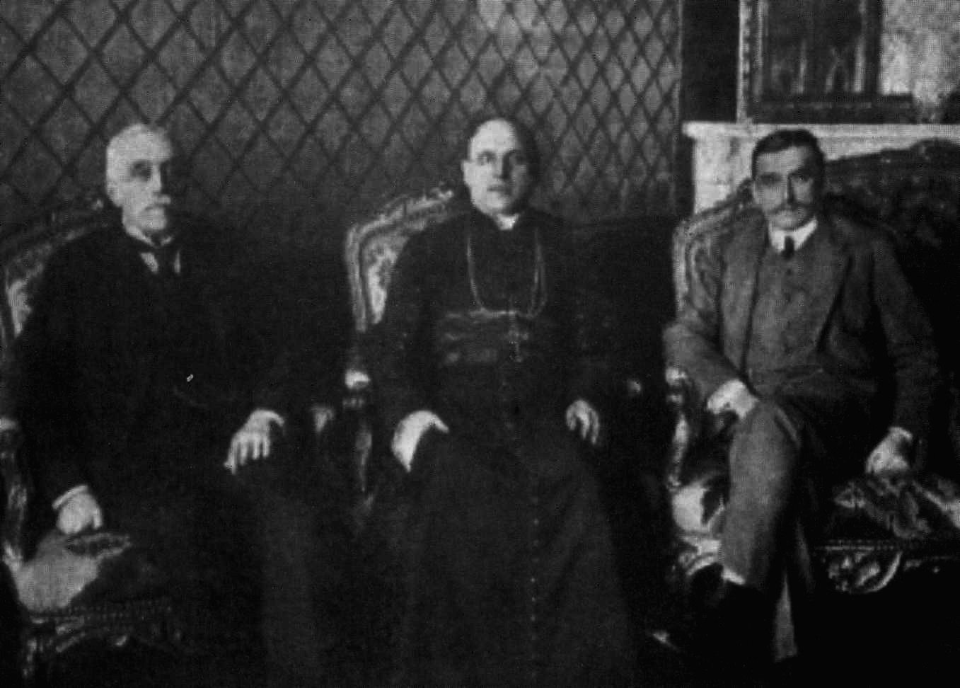 Regency Council of the Kingdom of Poland, from left: Józef Ostrowski, kard. Aleksander Kakowski, Zdzisław ks. Lubomirski